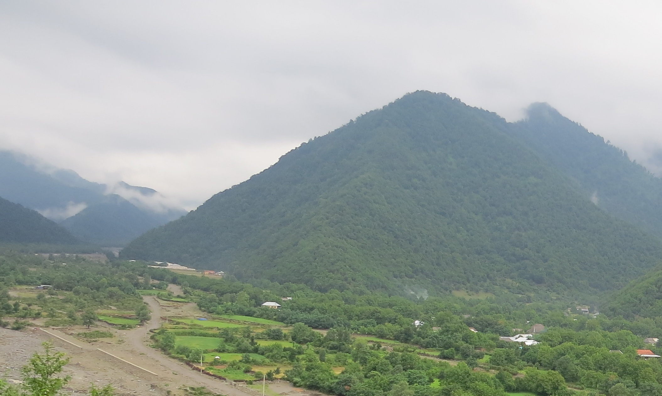 Tufand1